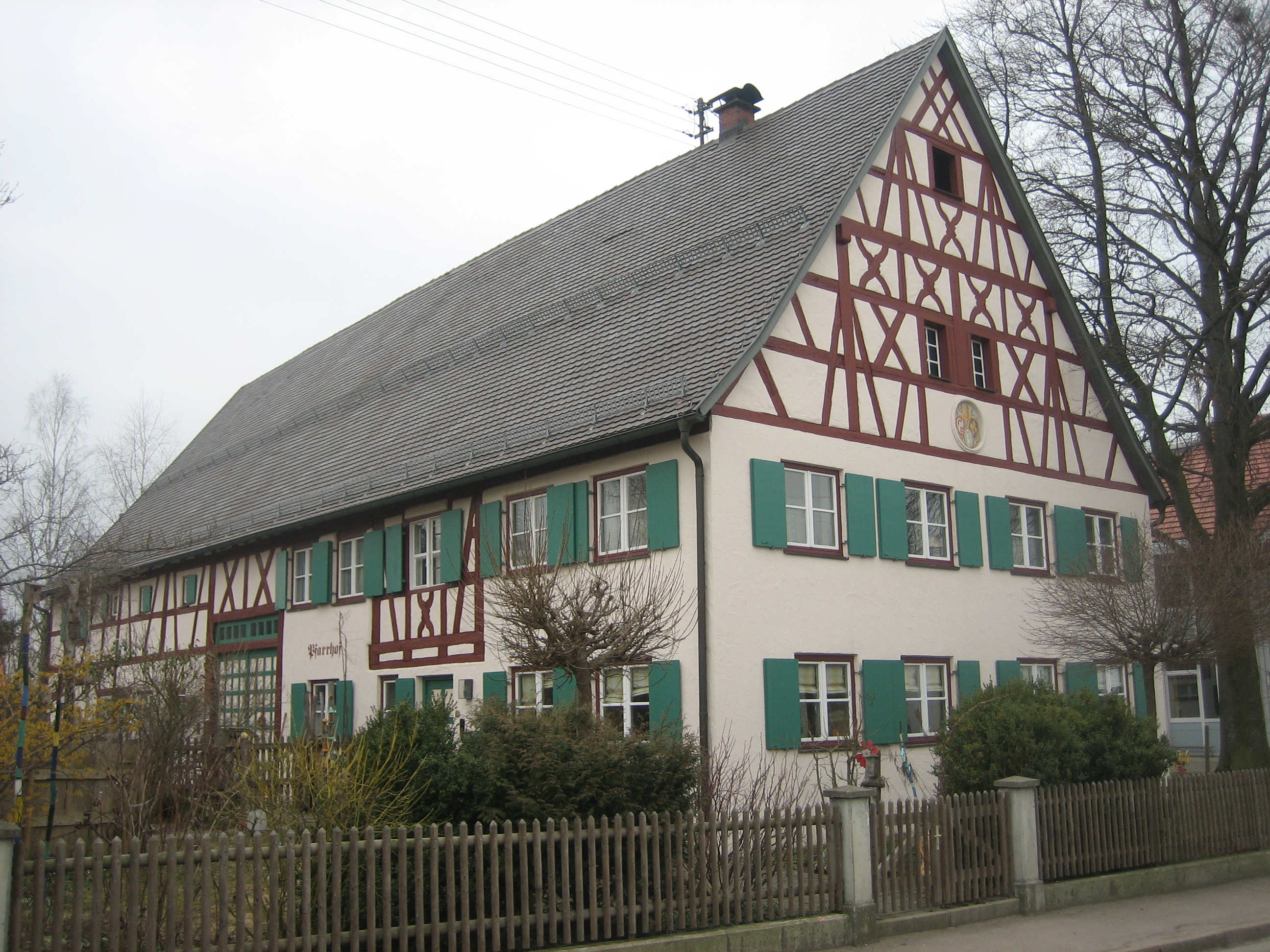 Wolfertschwenden, Landkreis Unterallgäu, Bayern